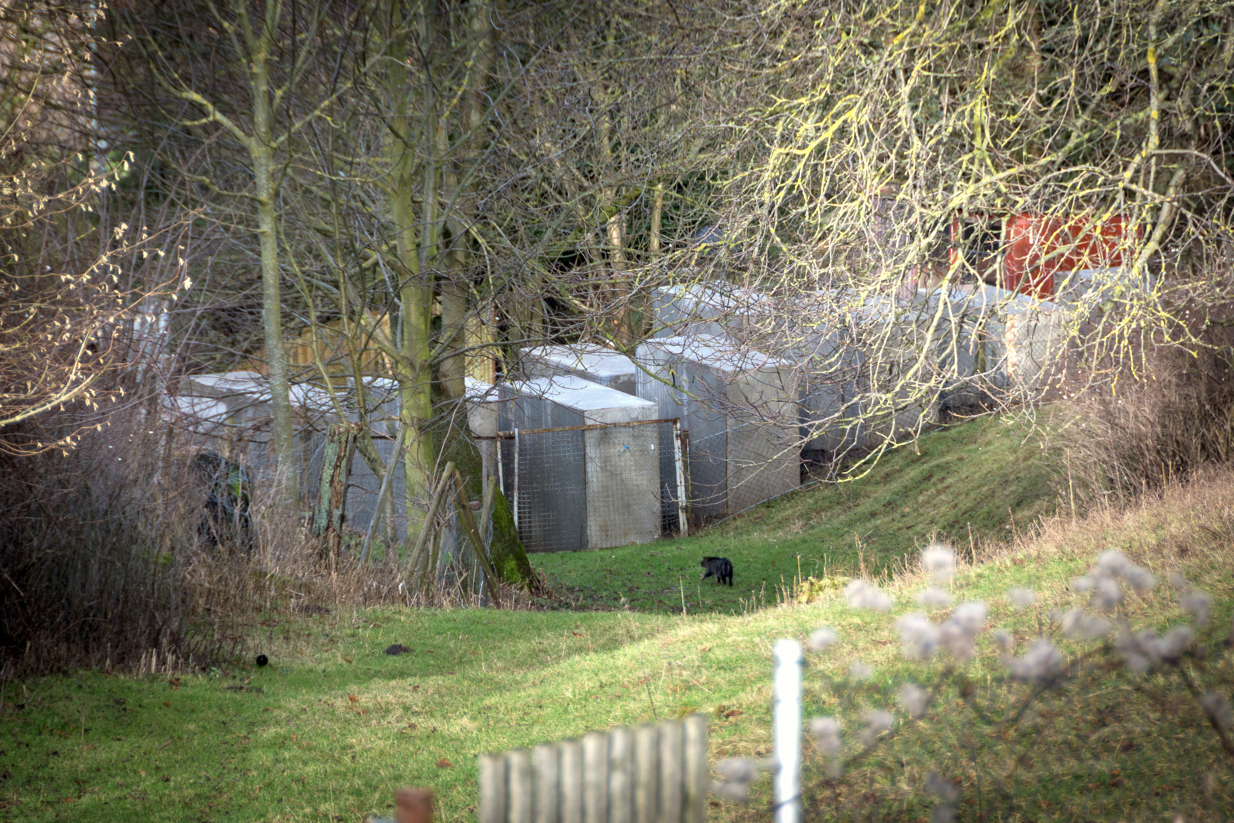 Nachbildung des Berliner Holocaust-Mahnmals in der Friedensstraße 25 in Bornhagen, Deutschland.